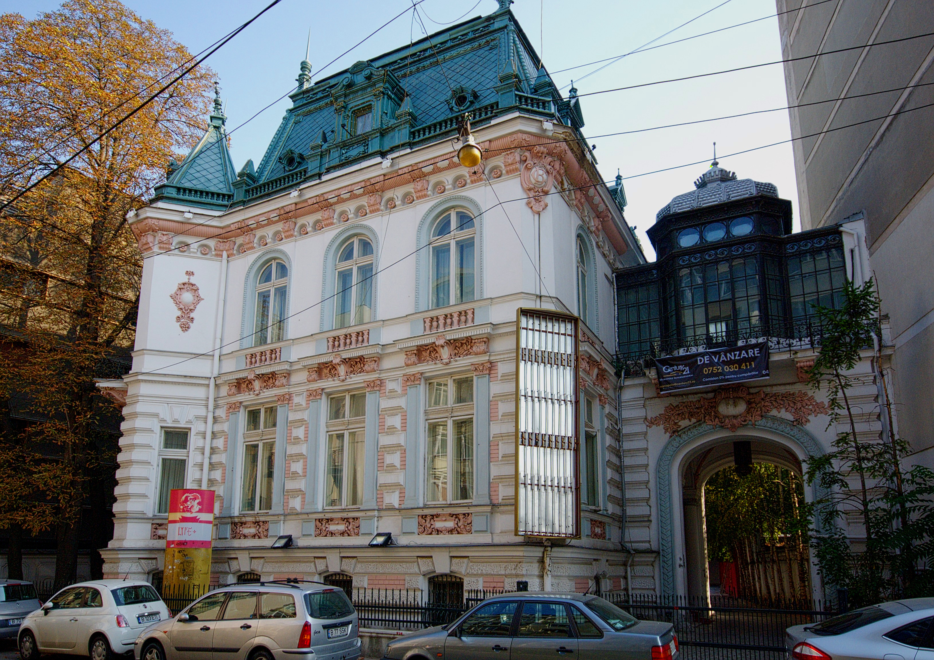 Casa Radu Arion, Biserica Amzei 6